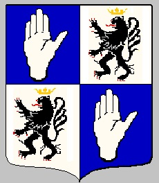 la famille de Magnac originaire de Saint-Junien (Haute-Vienne) portait écartelé aux 1 et 4 d'azur à une main mise en pal d'argent, aux 2 et 3 d'argent à un lion de sable couronné d'or, armé et lampassé de gueules (Etienne Vallery-Radot del.)